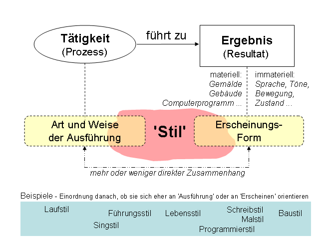 Definition von 'Stil'